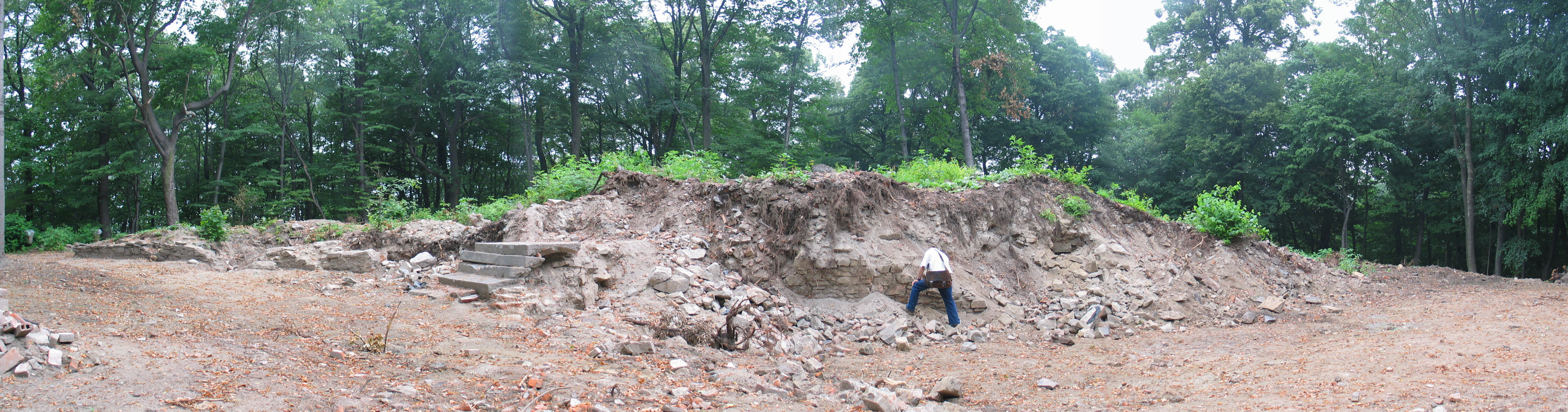 w 2003r. staraniem Towarzystwa Wzgórz Strzelińskich rozpoczęto prace porządkowe i badania architektoniczno-archeologiczne